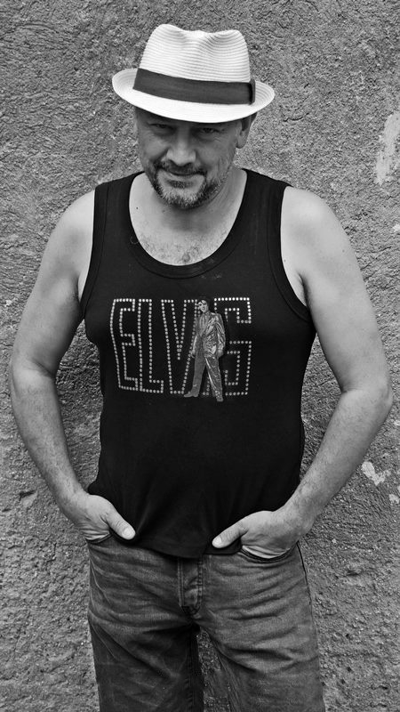 Znamenák István (Budapest, 1966. január 8. –) Jászai Mari-díjas magyar színész, rendező.